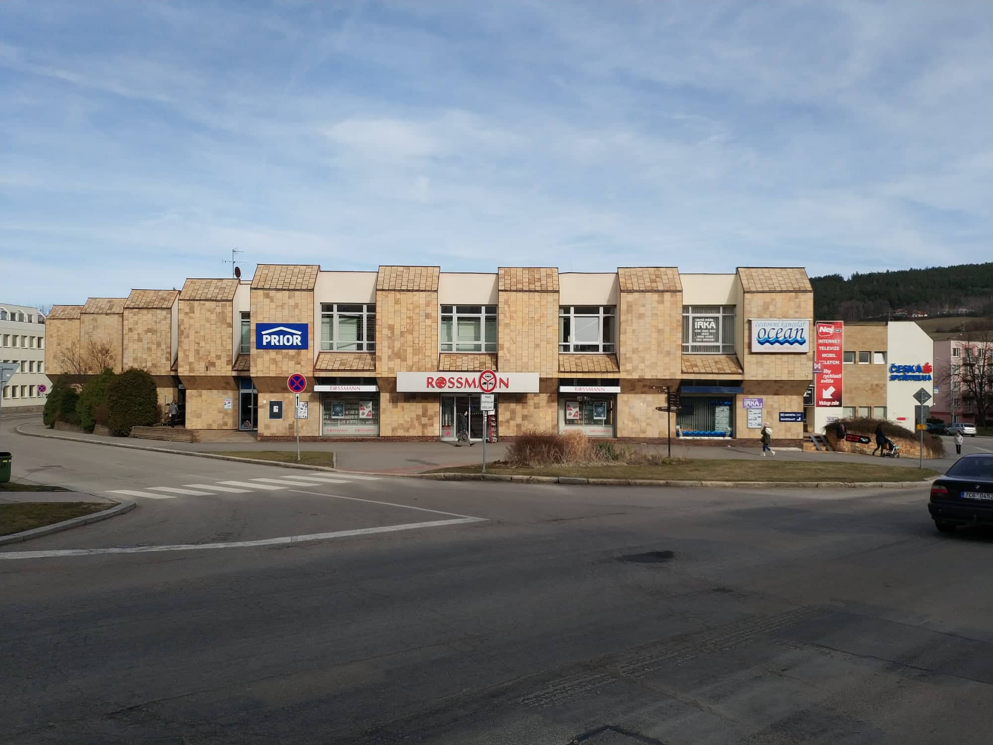 OC Libín v Prachaticích. Česká republika.